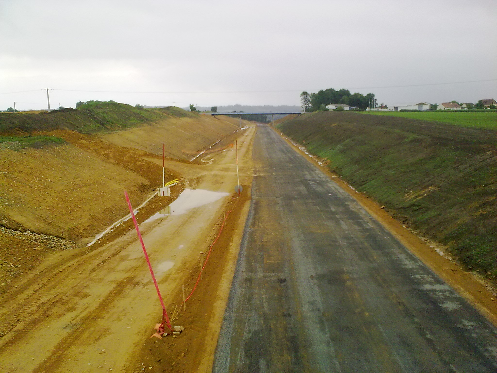 L'autoroute A 65 en construction entre Langon et Pau. Photo prise le dimanche 6 juin 2010. France.